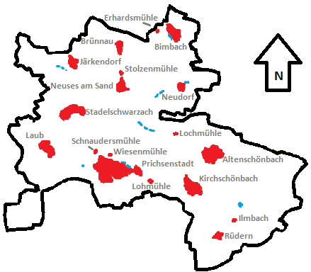 Karte: Prichsenstadt mit Ortsteilen, Legende: schwarz- Gemeinde Prichsenstadt, blau- Fluss Main, Seen, rot- besiedelte Fläche